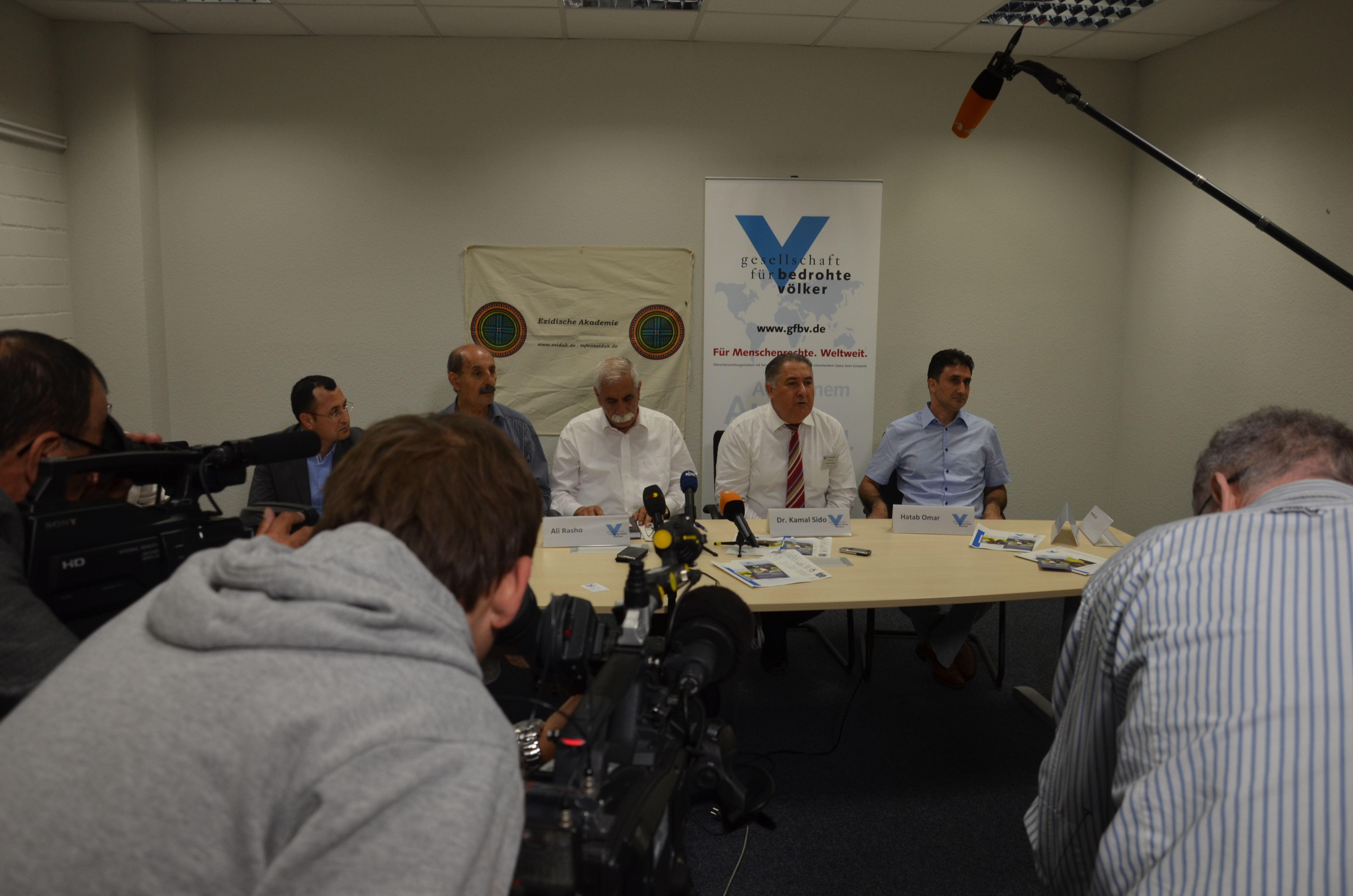 Aufgrund der Anfang August 2014 durch die ISIS-Extremisten eroberten Gebiete im Nord-irakischen Gebiet Sinjar waren etwa 200000 Eziden sowie andere religiöse Minderheiten in der Autonomen Region Kurdistan rund um Mossul auf der Flucht. Die Gesellschaft für bedrohte Völker sowie die Ezidische Akademie in Hannover befürchteteten einen humane Katastrophe und einen neuen Völkermord an den Mitgliedern ihrer und anderer Glaubensgemeinschaften. Am 5. August 2014 luden sie zu einer Pressekonferenz, in der Vertreter des öffentlich-rechtlichen Rundfunkanstalten sowie der Tagespresse erschienen ...